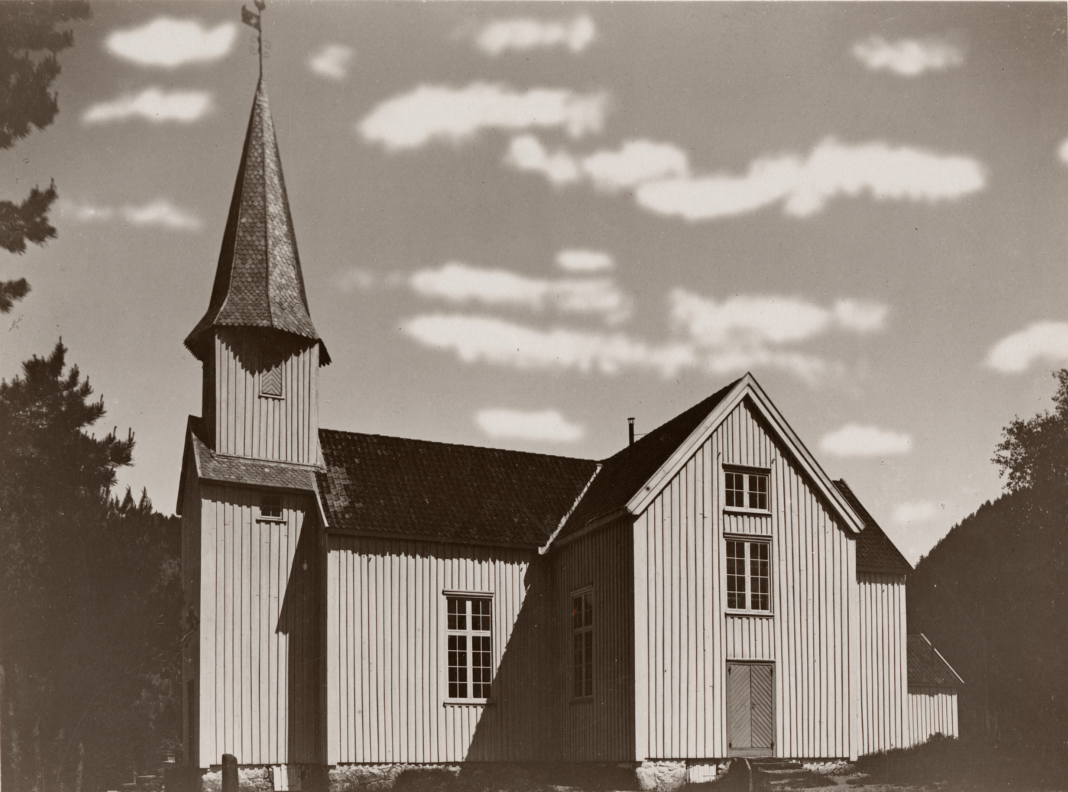 Laudal kirke i Laudal, Vest-Agder This image on crowdsourcing geotagging platform Fotodugnad